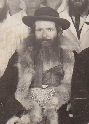 הרב שמואל אהרו שזורי בעת ביקור רבנים בתחנת הכוח של חיפה